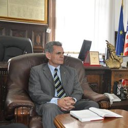 UP rector